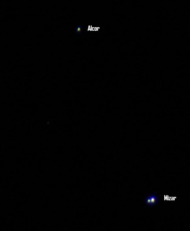 Mizar, Dubbel-ster, en Alcor, Foto: Chris Kuhl